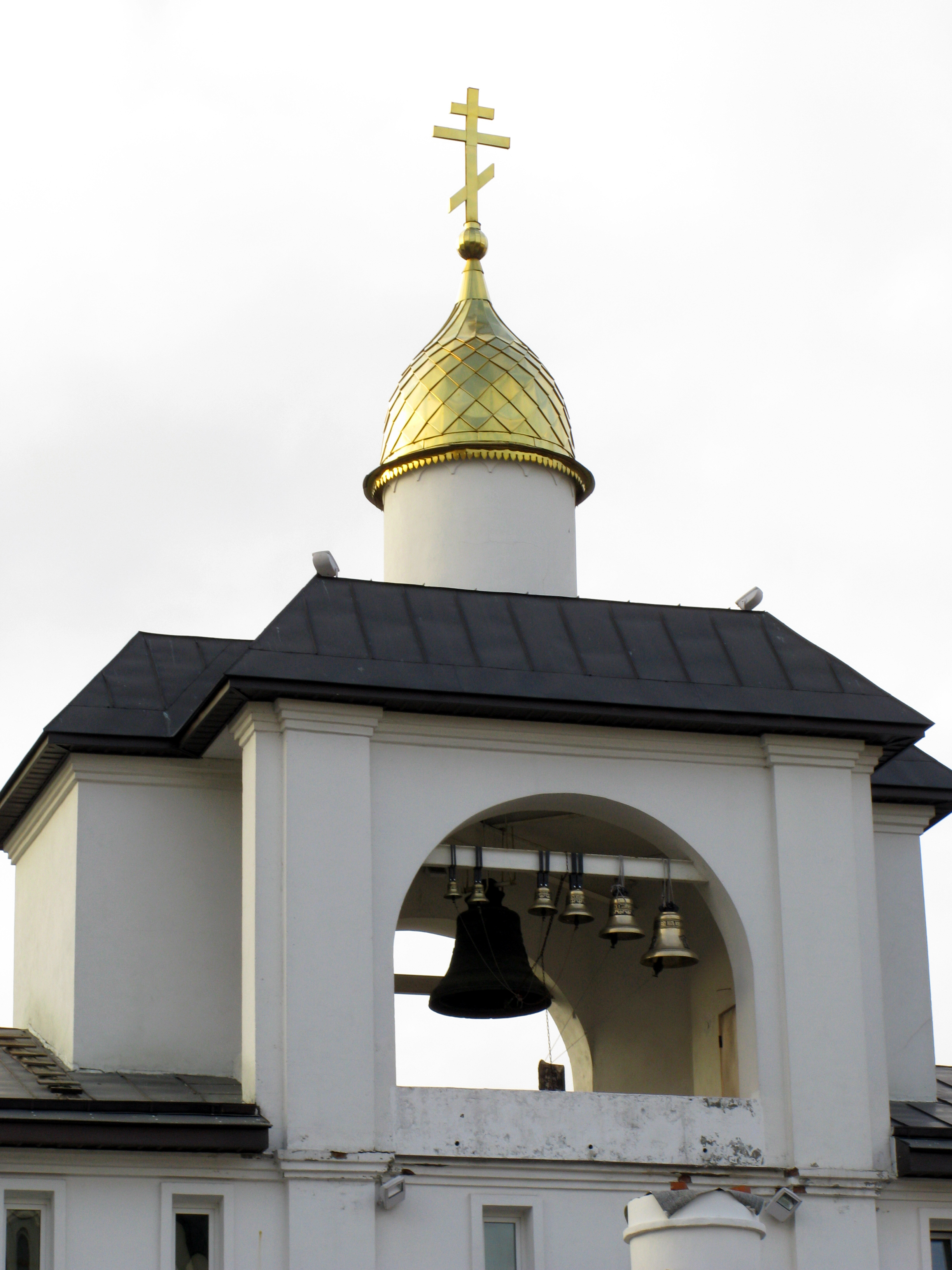 Храм Святого благоверного князя Александра Невского (Балашиха)